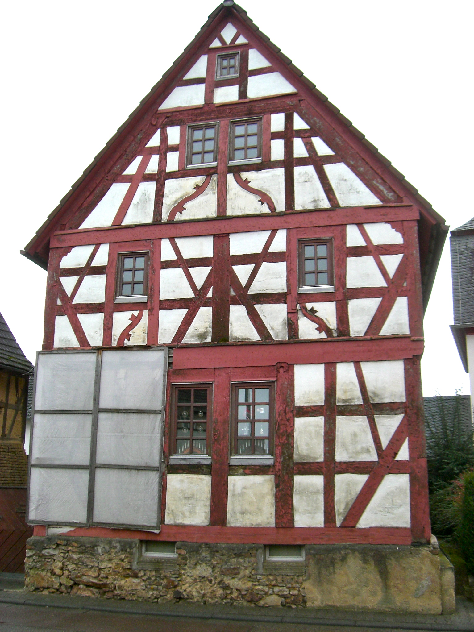 Bauschäden nach einer Fachwerksanierung mit Fenstersanierung